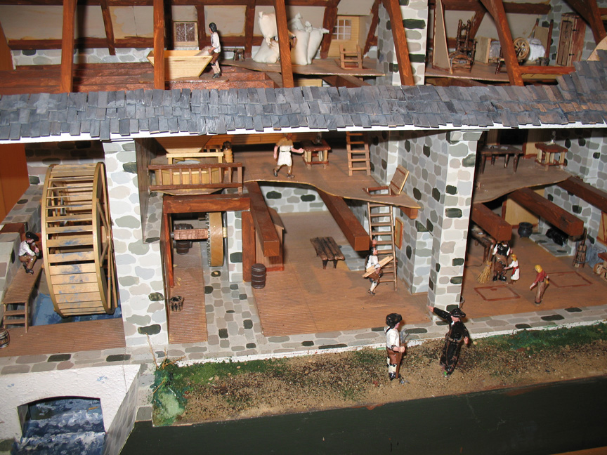 Maquette du Moulin des Jésuites, Ville de Québec (Québec) Canada. Le Moulin des Jésuites de Charlesbourg est un moulin à eau situé à Québec, à l’est de l'arrondissement historique de Charlesbourg (Trait-Carré). Il a été construit en pierre en 1740 et a cessé de fonctionner en 1940. Il abrite aujourd'hui un centre d'interprétation historique.